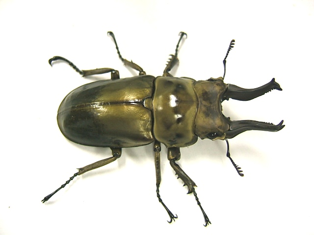 ローゼンベルグオウゴンオニクワガタの写真